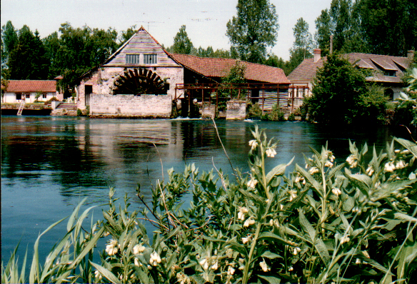 Le moulin de Maintenay au bord de l'Authie